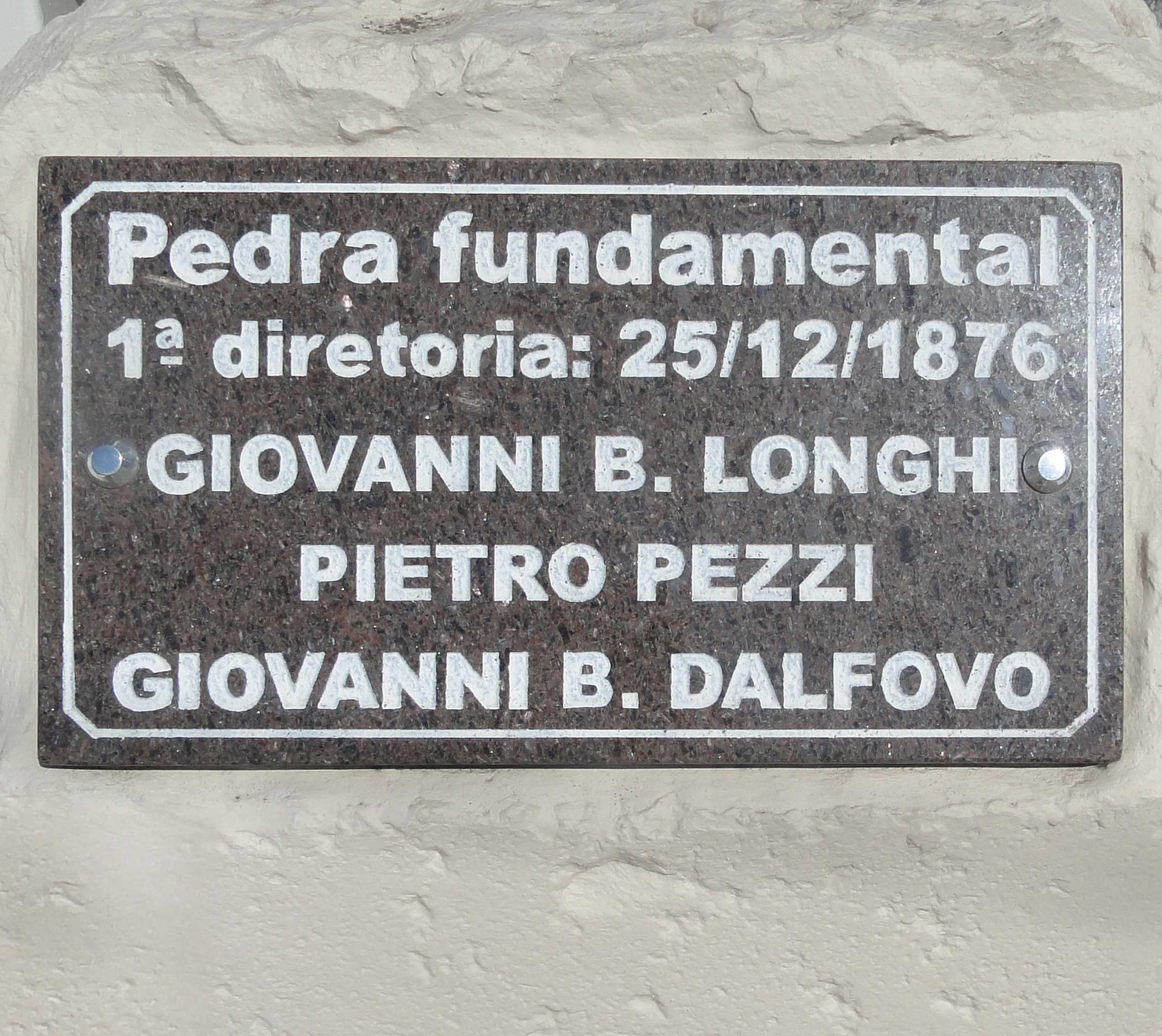 Pedra fundamental da comunidade ligada à igreja de São Romédio